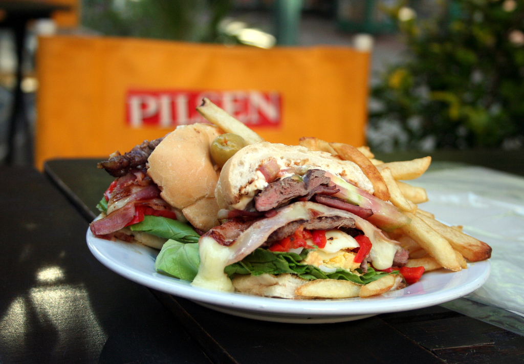 Uruguayan steak sandwich